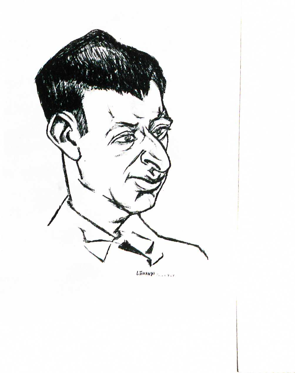 Lajos Tihanyi Porträt Yvan Goll 1927, schwarze Kreide/Papier